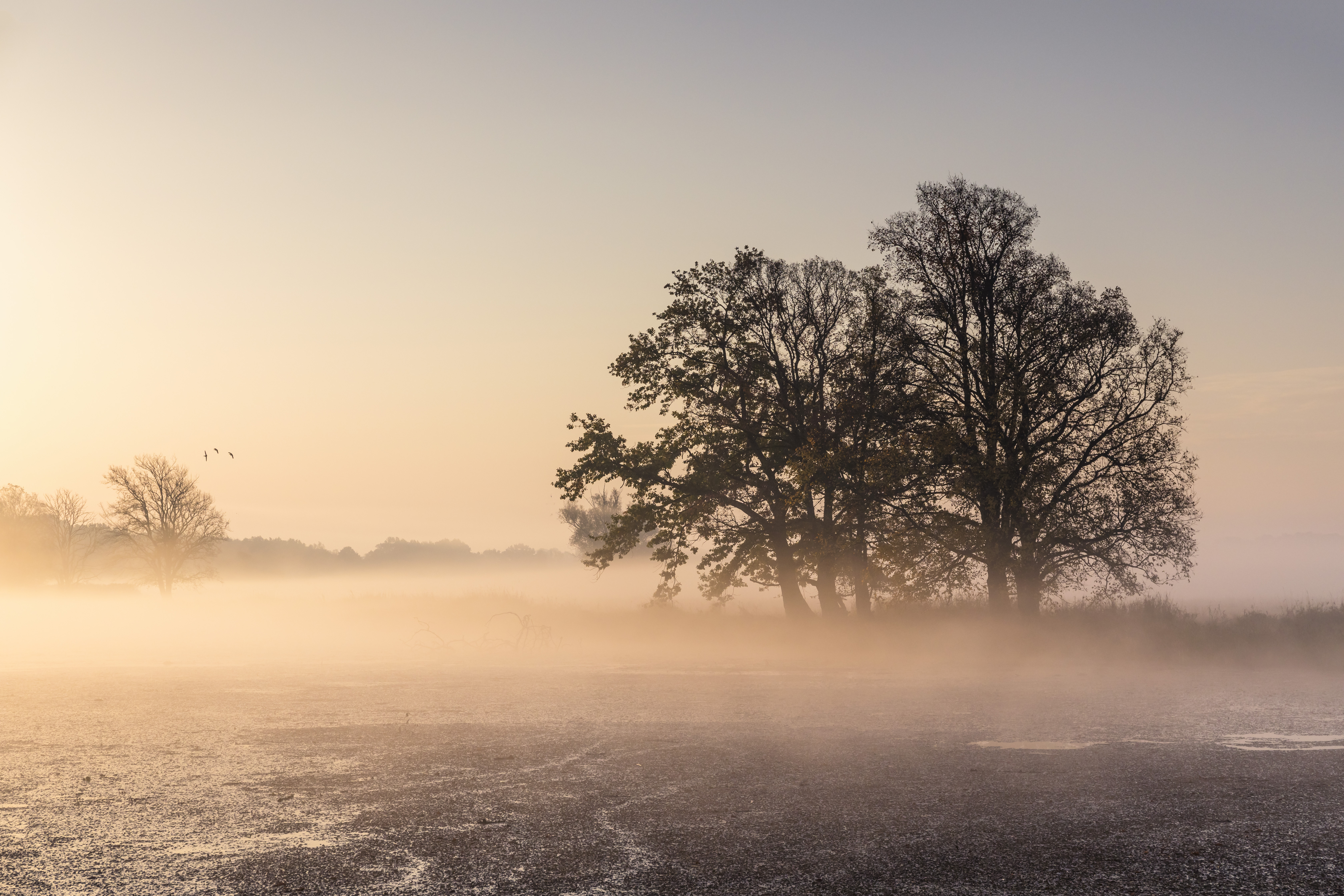 Im Winter sind diese Polder geflutet, der Fluss hat Platz sich auszubreiten. Im Sommer werden die Polder als Wiesen genutzt.